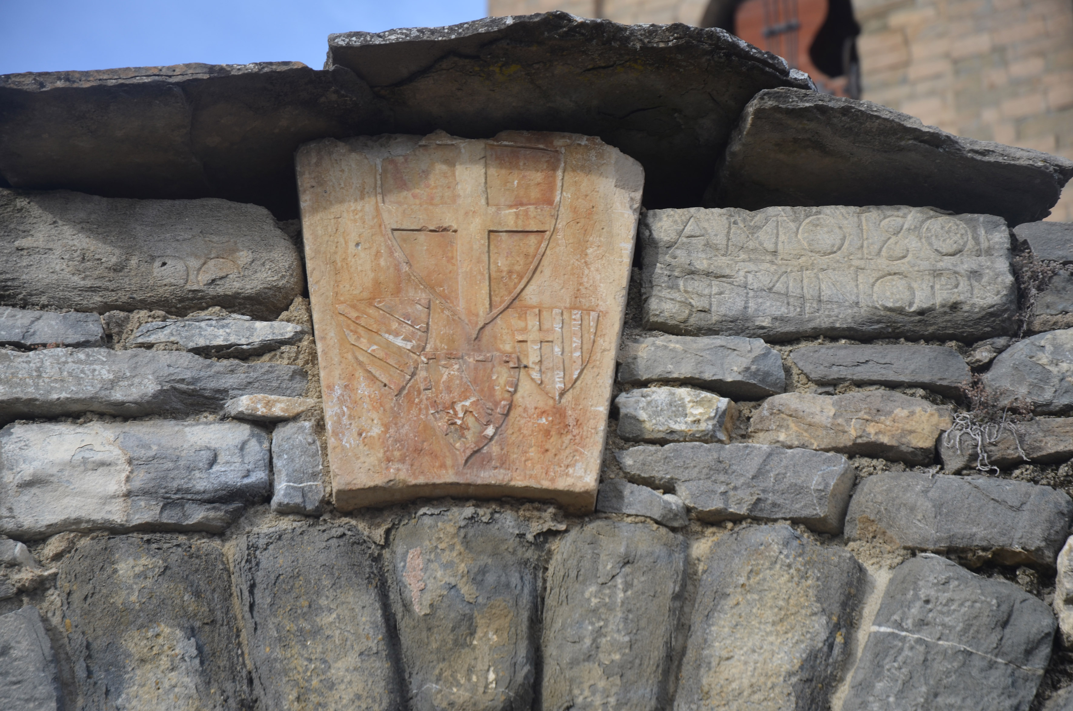 Montanyana (priorat de la comanda de Siscar). L'escut superior és el de l'orde de Sant Joan. En origen era policromat, la creu blanca (argent) i el fons en vermell (gules).